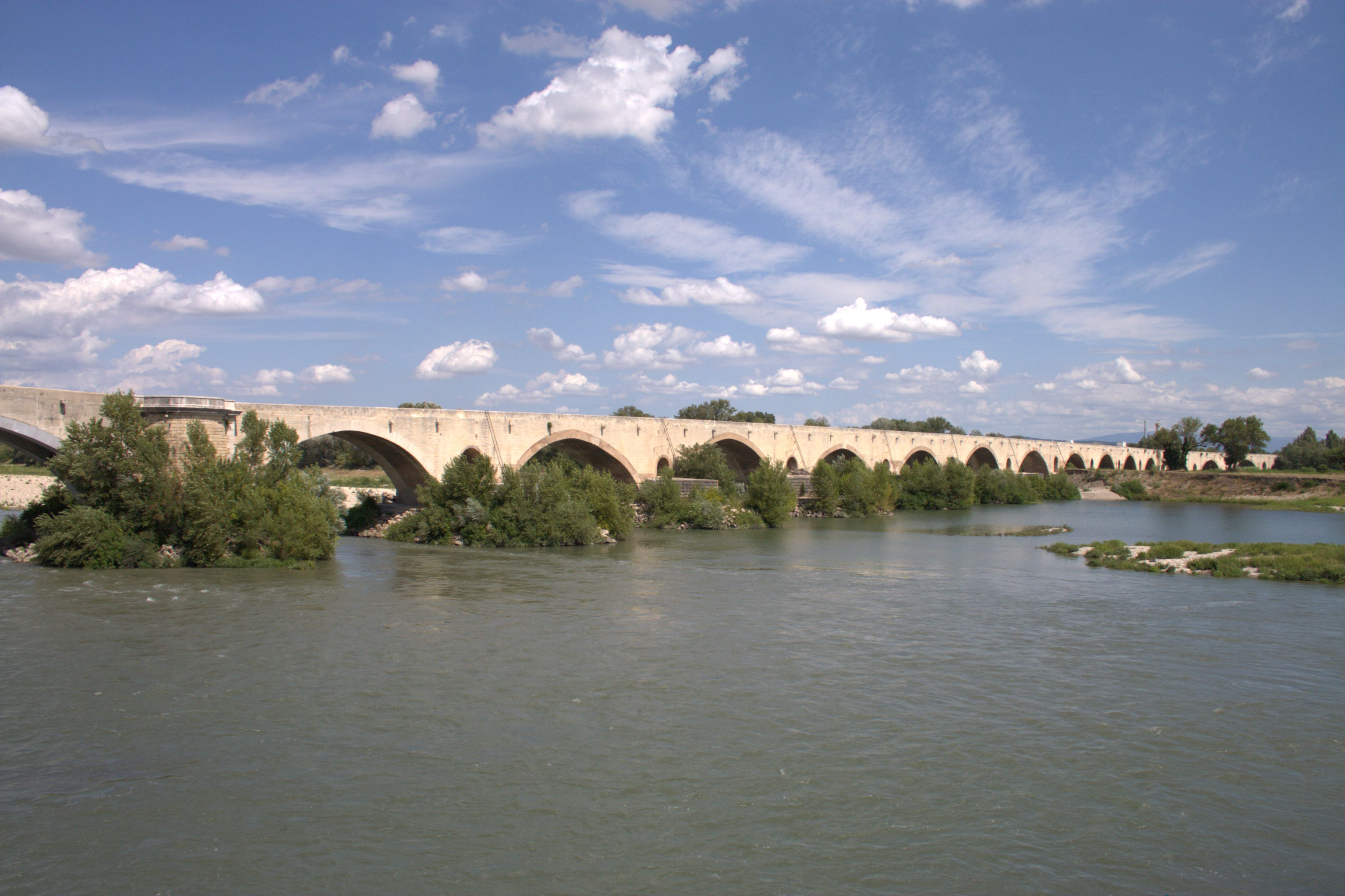 Pont Saint-Esprit(Pont-Saint-Esprit, France)